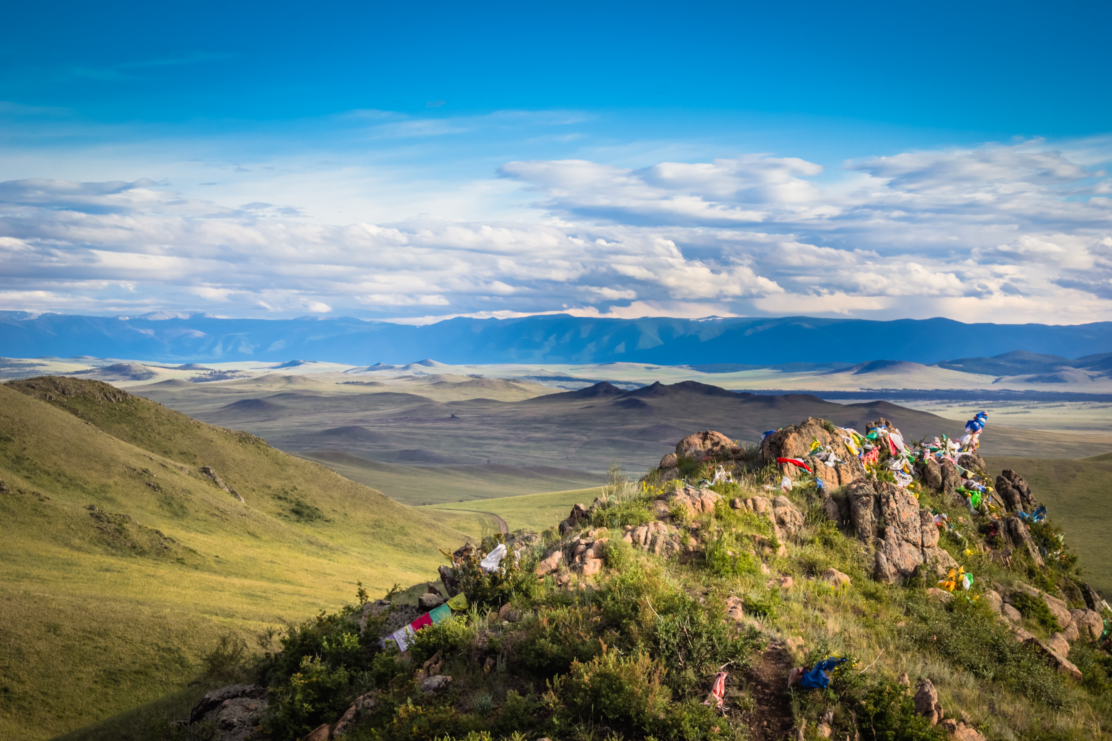 Тандынский район Республики Тыва. Местечко "Бурган изи"